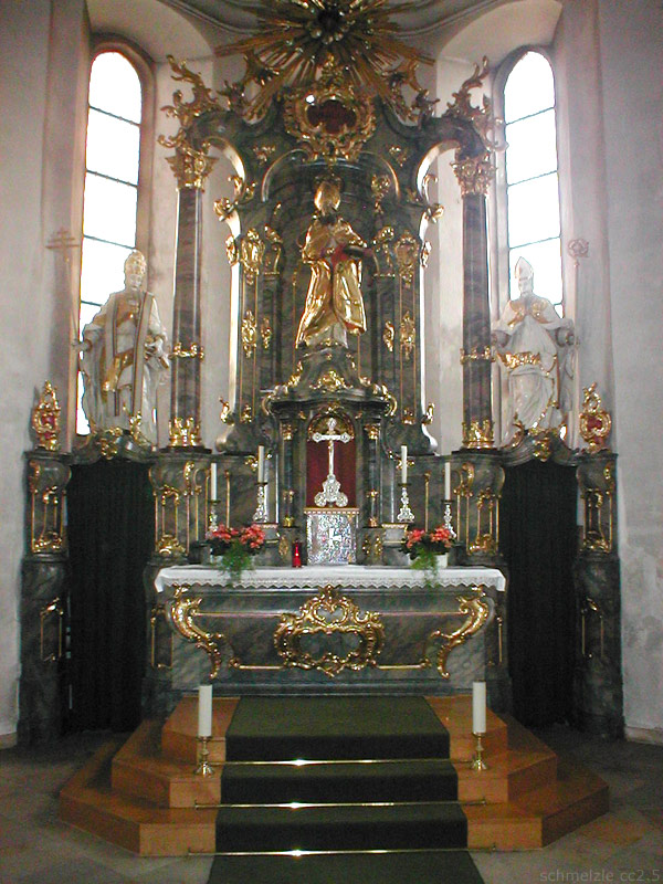 Hauptaltar Stadtkirche St. Nikolaus in Gundelsheim (Württ.)